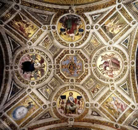 Virtudes, de Rafael, na Stanza della Segnatura, no Vaticano